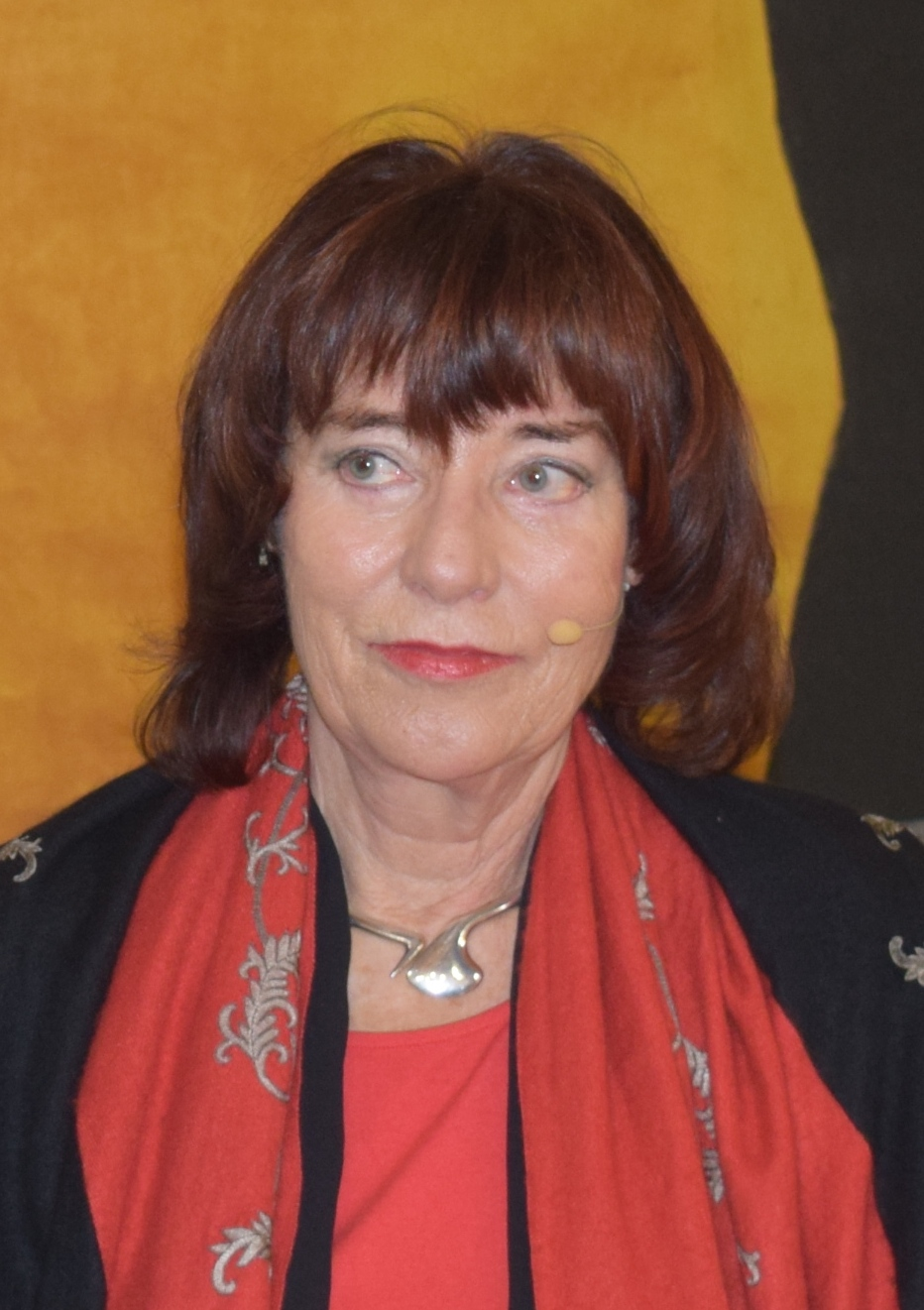 Martina Kempff (2016)